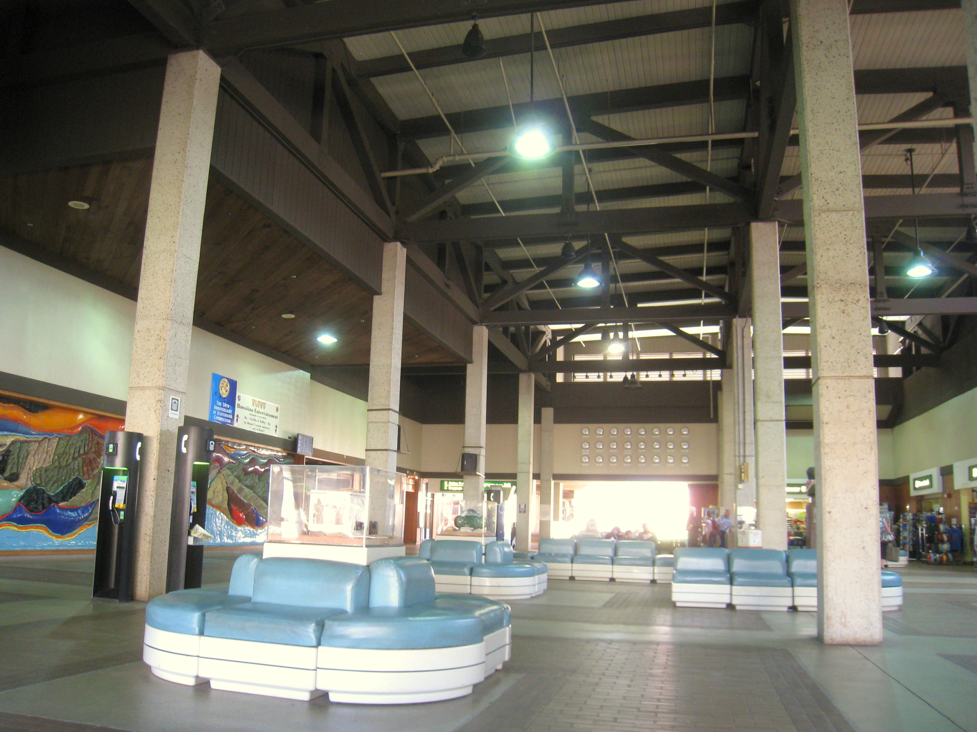 Lihue Airport, Lihue, Kauai, Hawaii, USA.